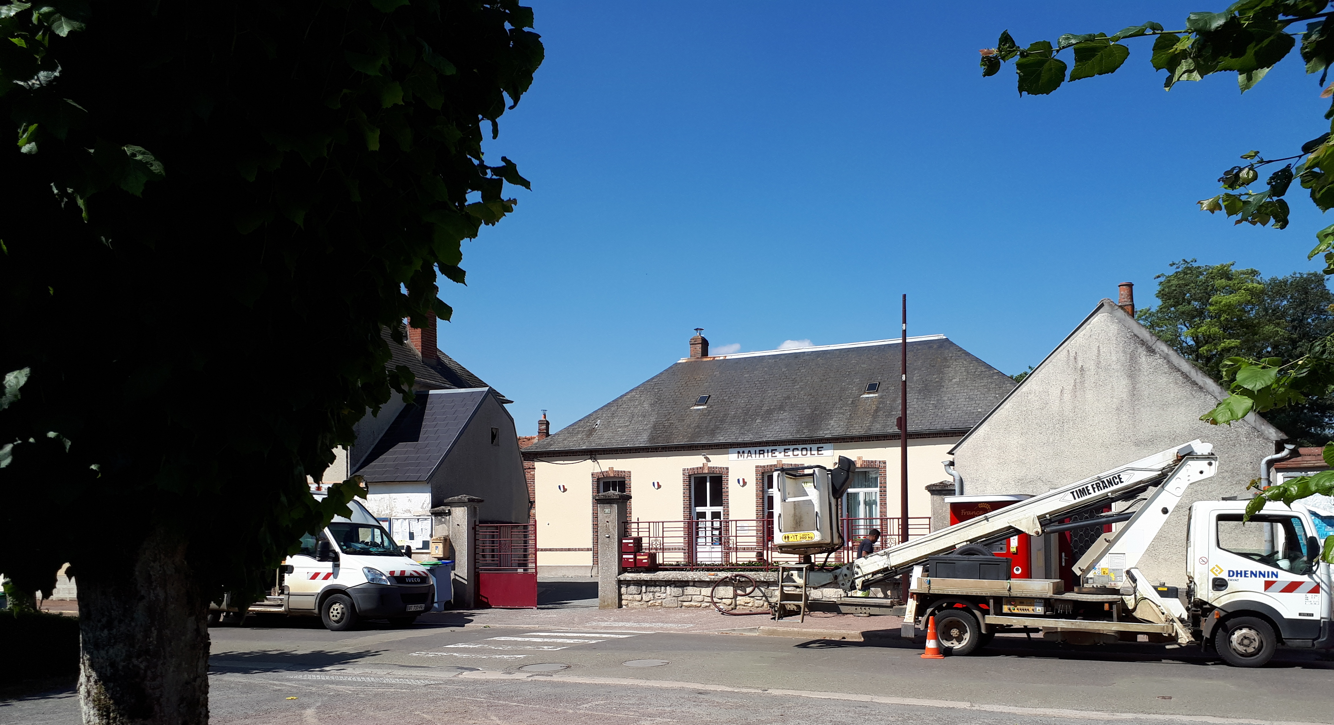 Mairie de Châtenay (Eure-et-Loir).